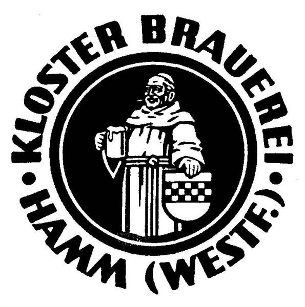 Dieses Bild zeigt das Logo der ehemaligen Klosterbrauerei Pröpsting aus Hamm.